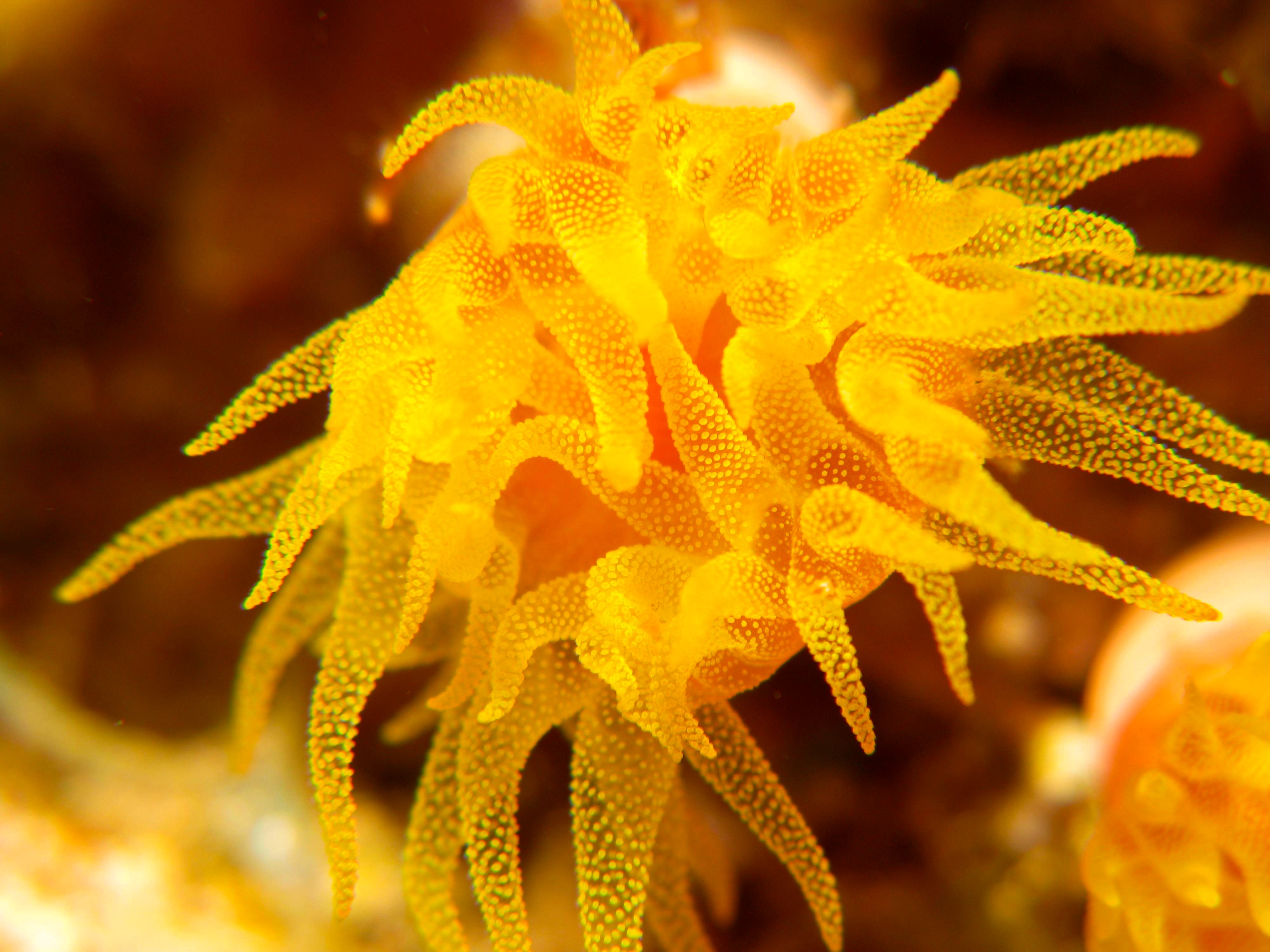 Dendrophyllia gracilis en el mar Rojo, Egipto